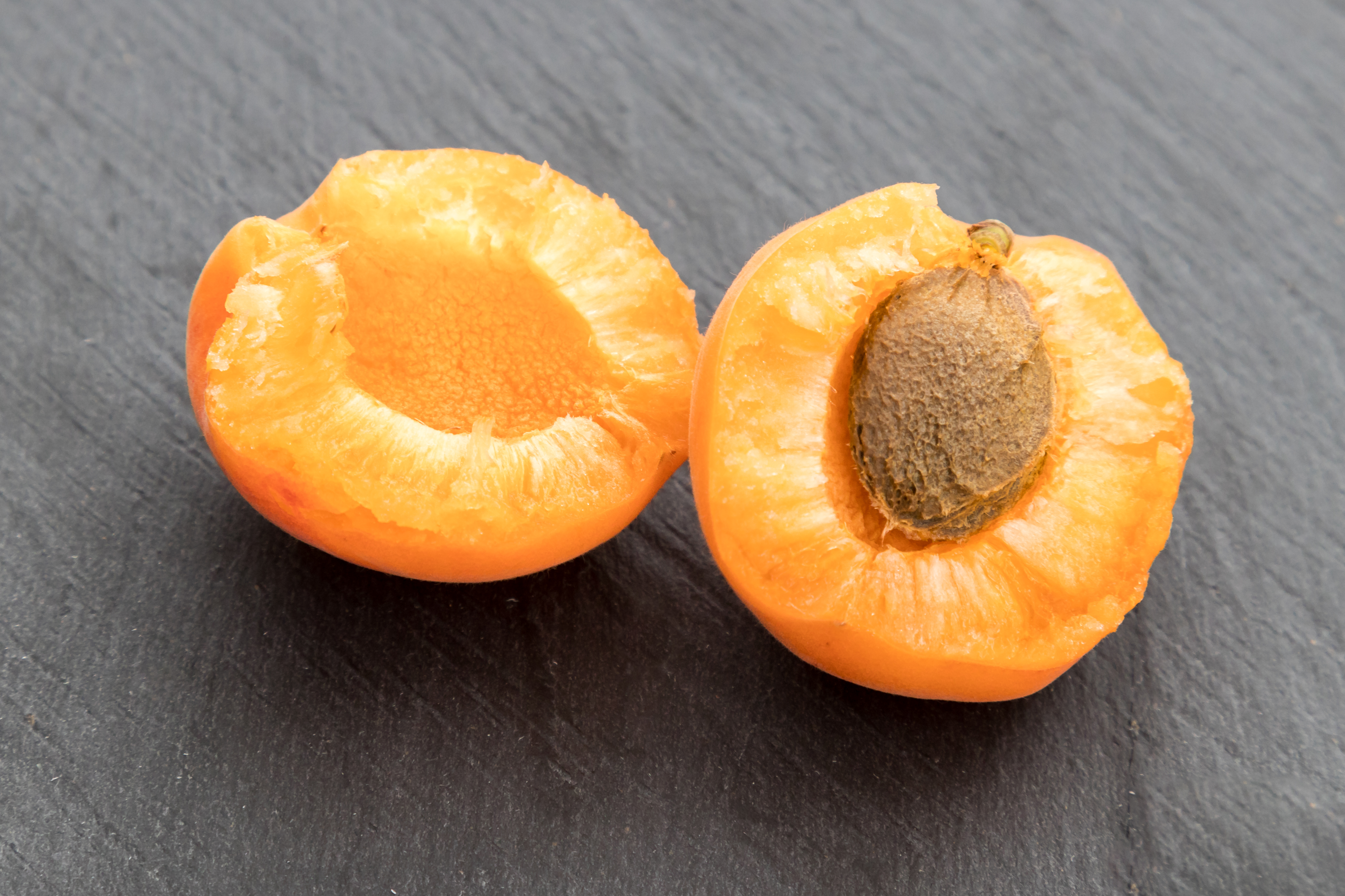 Aprikose